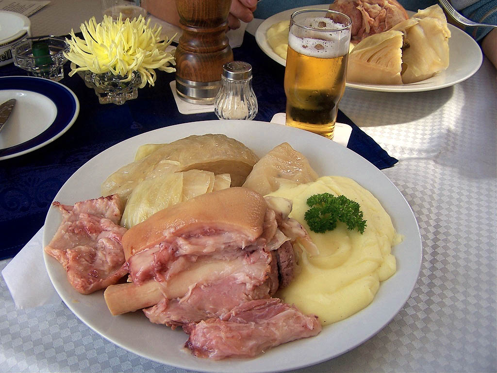 Kombes mit Eisbein und Kartoffelbrei im "Hirsch" Rentwertshausen